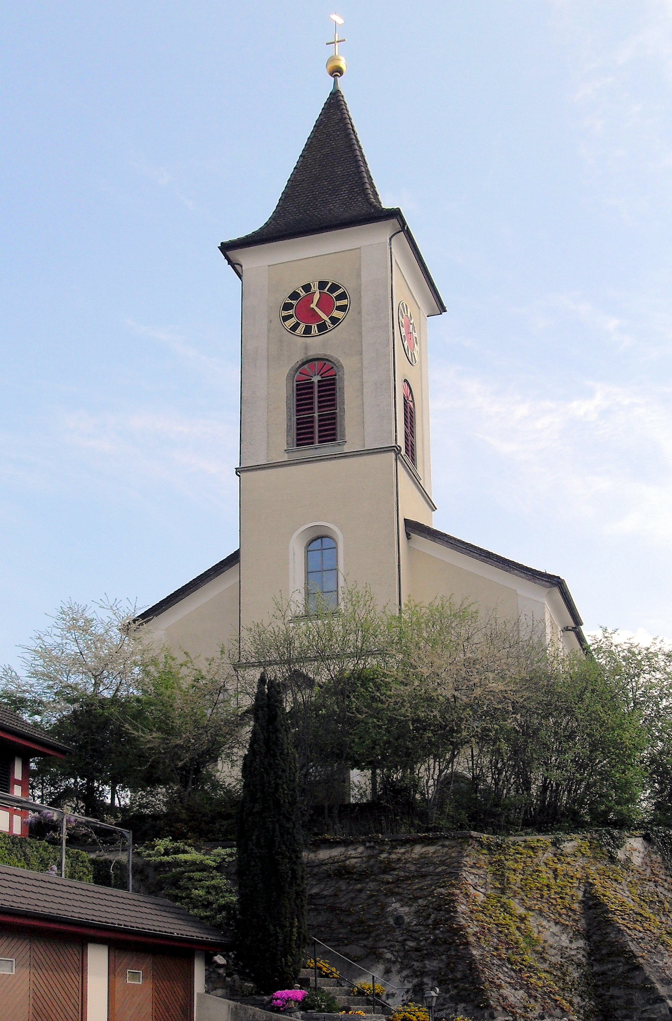 Paritätische Kirche St. Peter und Paul in Uesslingen, Kanton Thurgau, Schweiz